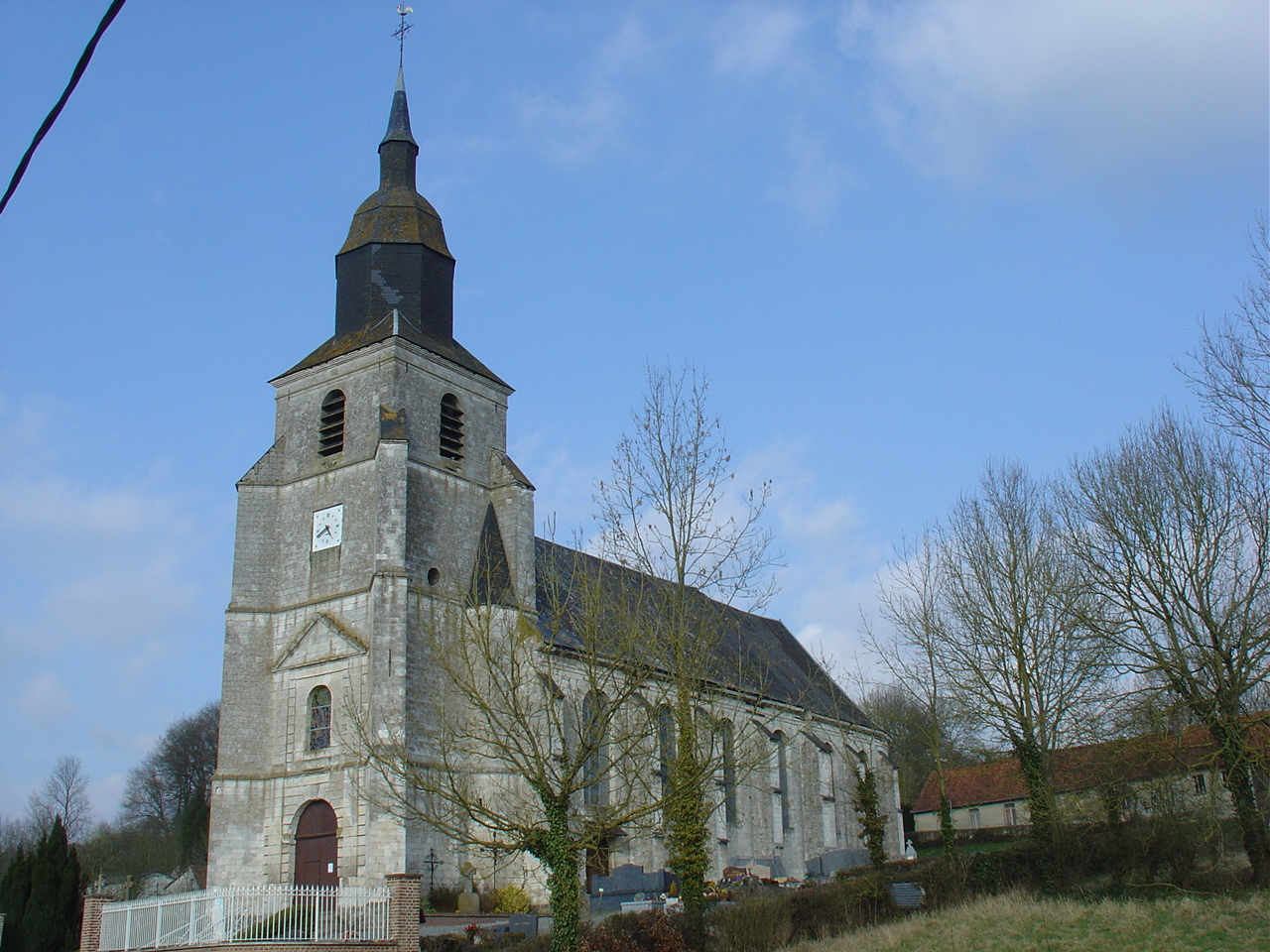 Église Notre-Dame de Buire-au-Bois